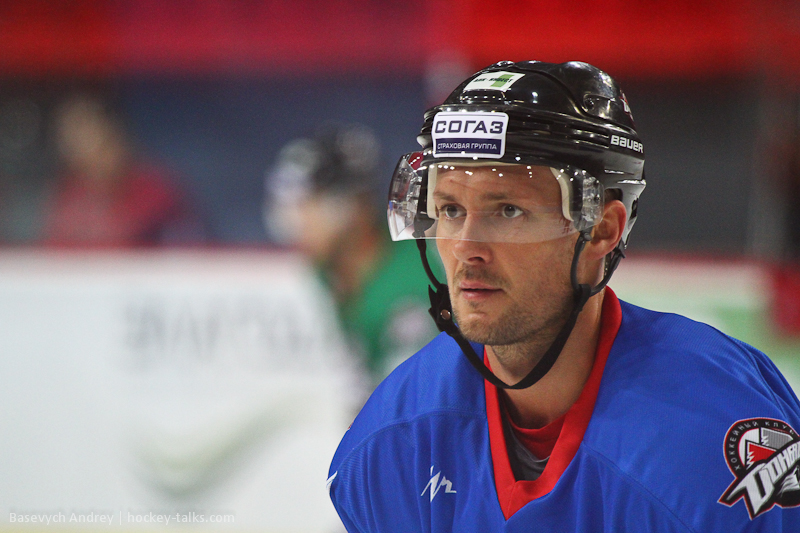 украинский хоккеист, нападающий. Воспитанник киевского хоккея. В настоящее время является игроком донецкого «Донбасса», выступающего в КХЛ.